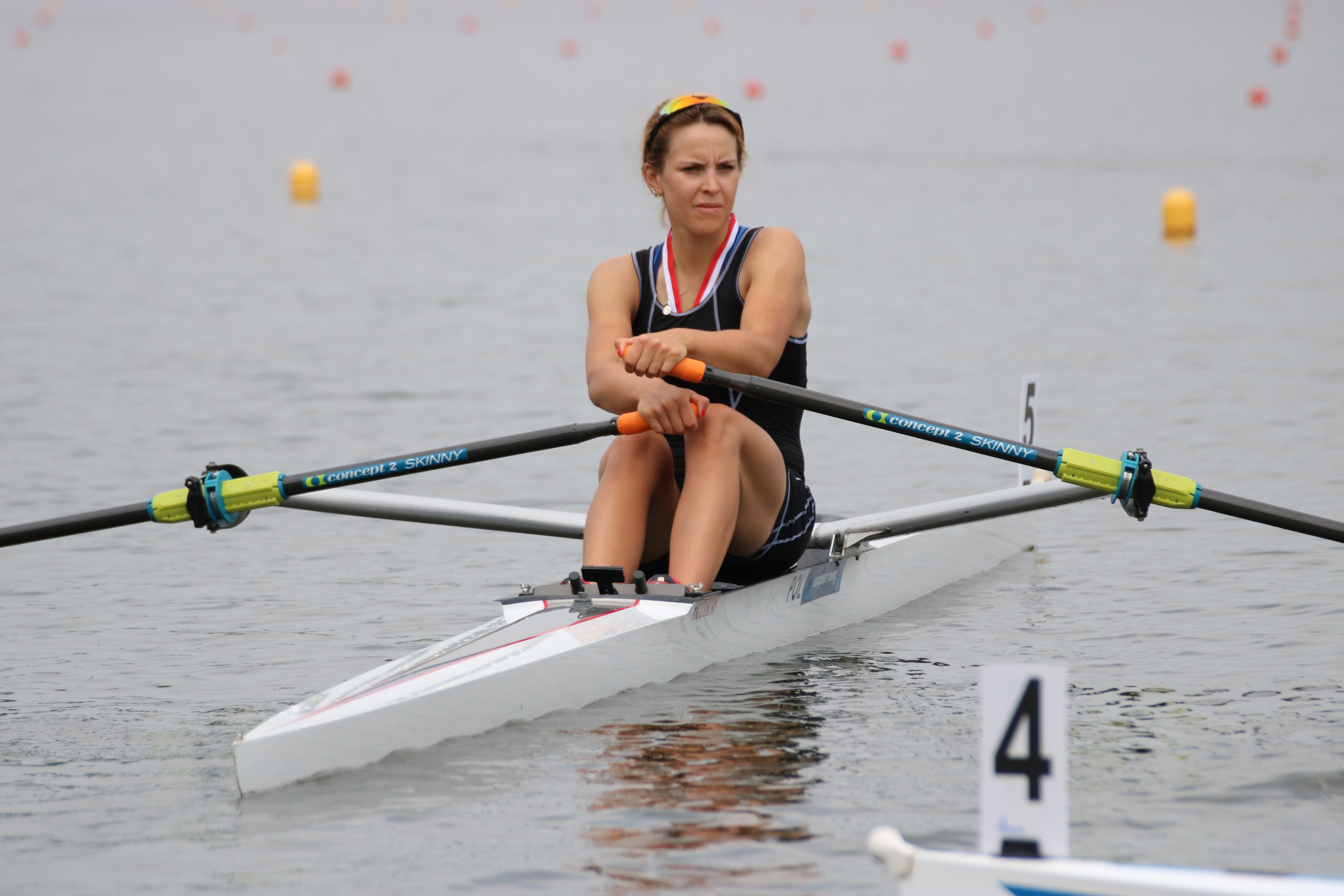 Mistrzostwa Polski Seniorów, Poznań (10.06.2018) srebrna medalistka biegu 1xKL AZS-AWF Kraków (K. Wełna)